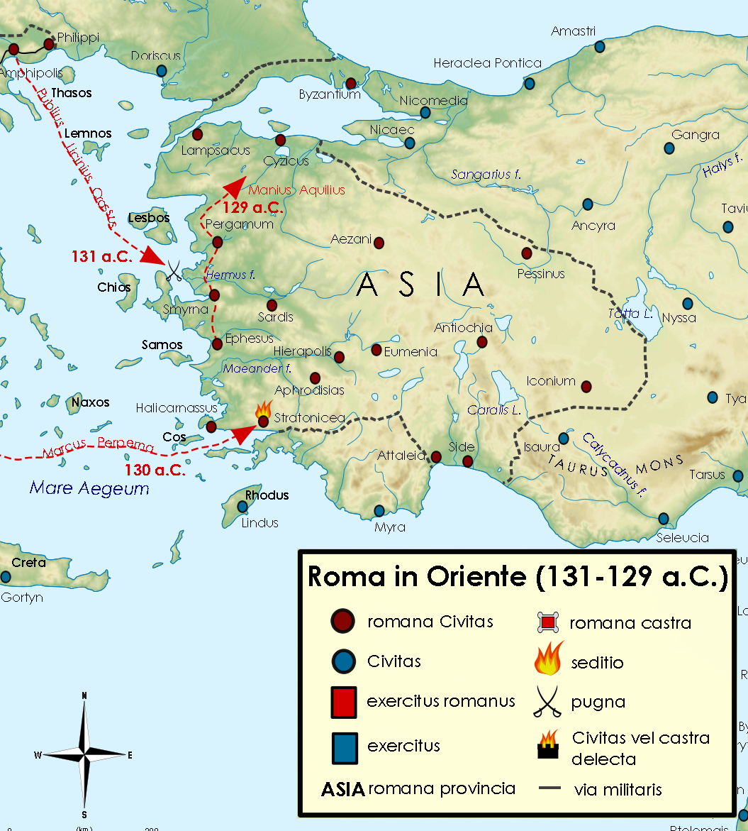 Mapa da Ásia Menor